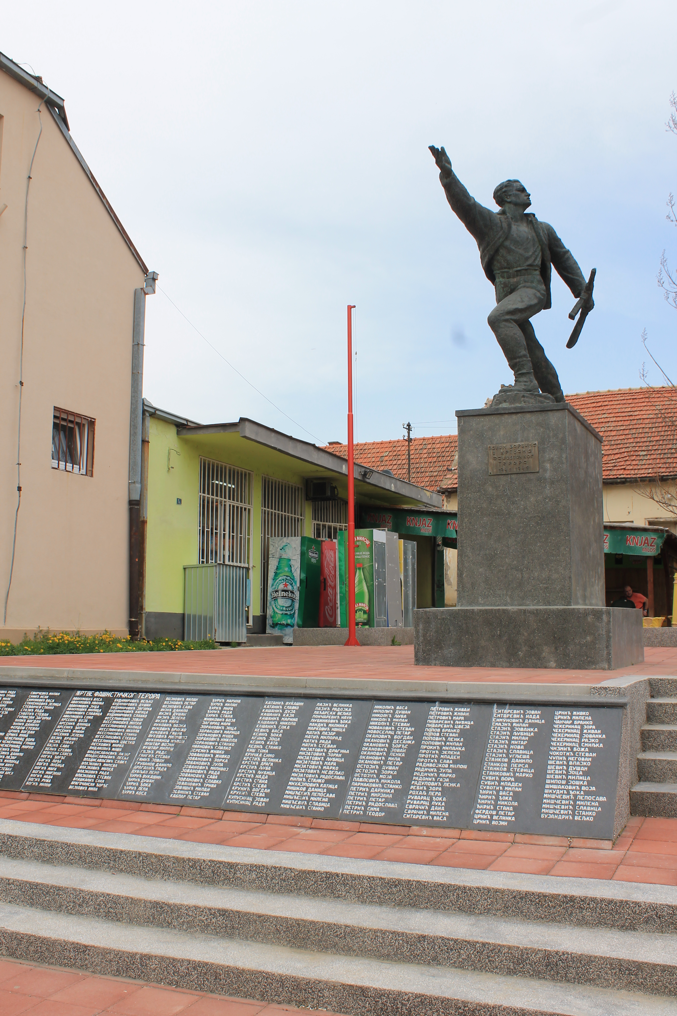 Divoš